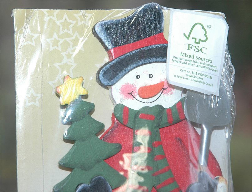 nach Forest Stewardship Council (FSC) zertifiziertes Produkt